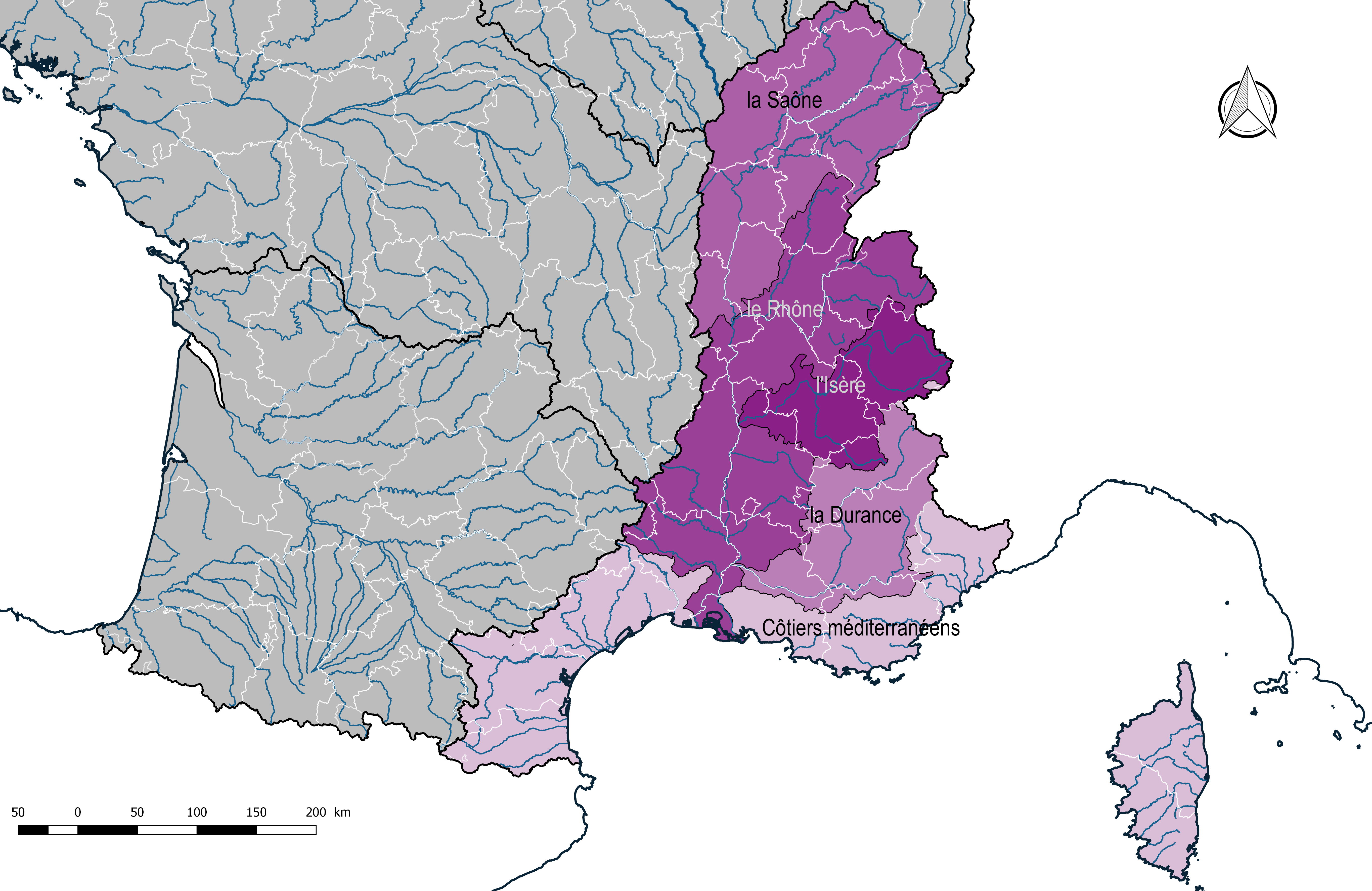 Carte du bassin hydrographique Rhône-Méditerranée-Corse(France) et de son découpage en régions hydrographiques.